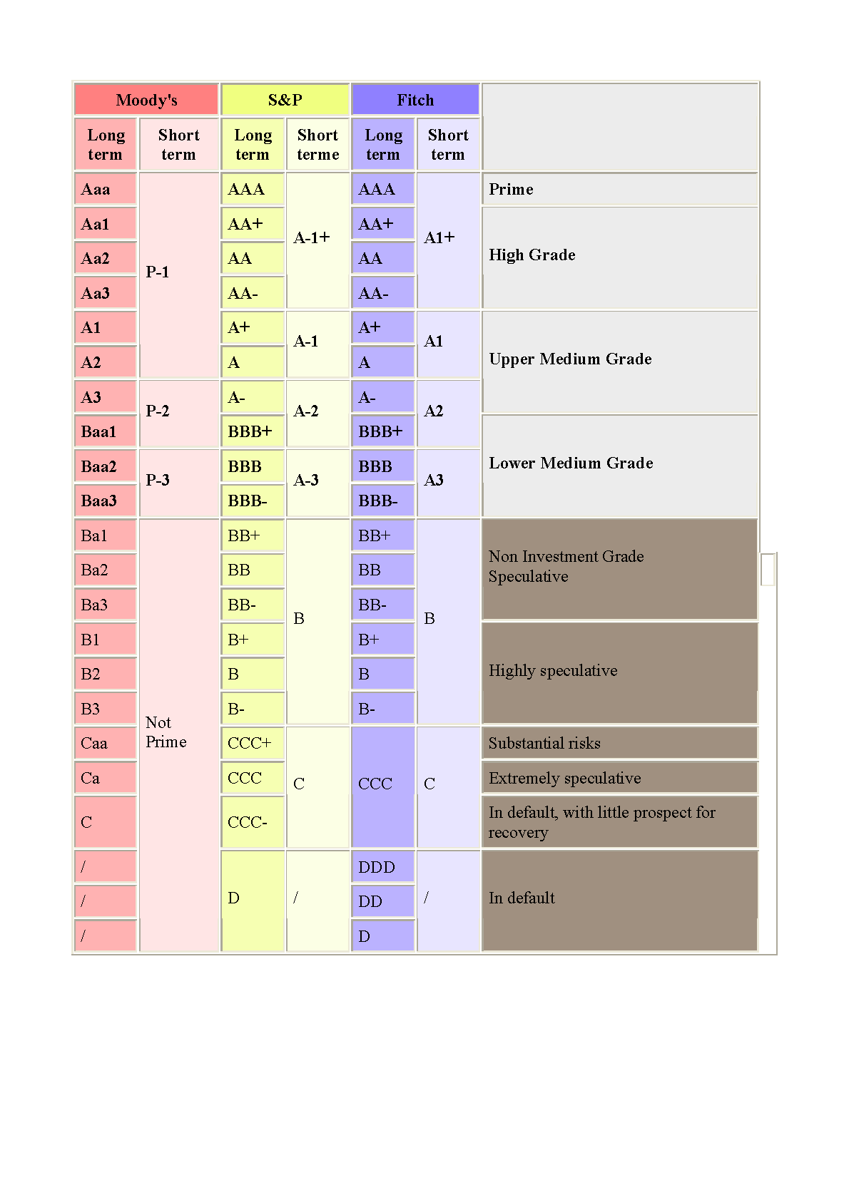 Moody'+ S&P + MOSH